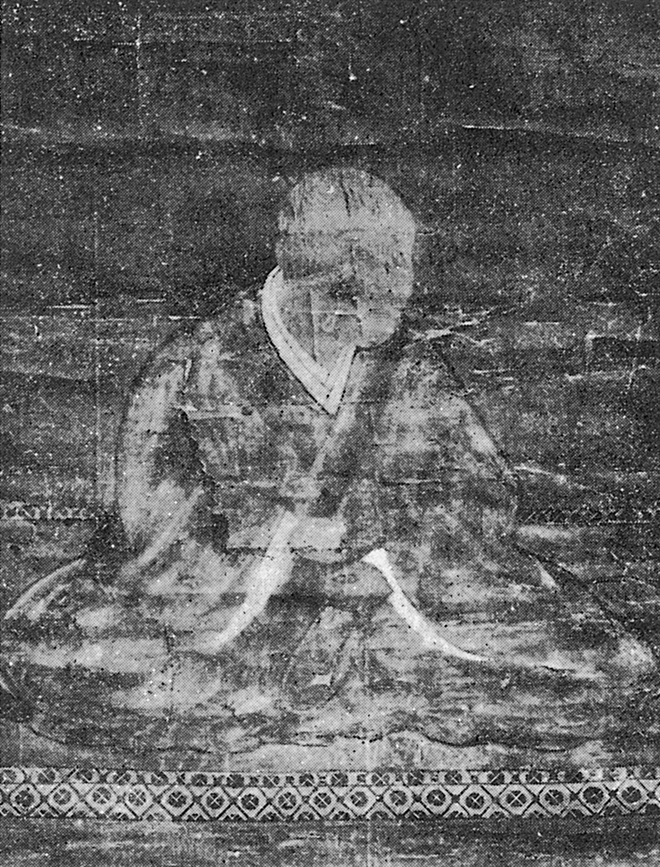 伊東義祐の肖像。